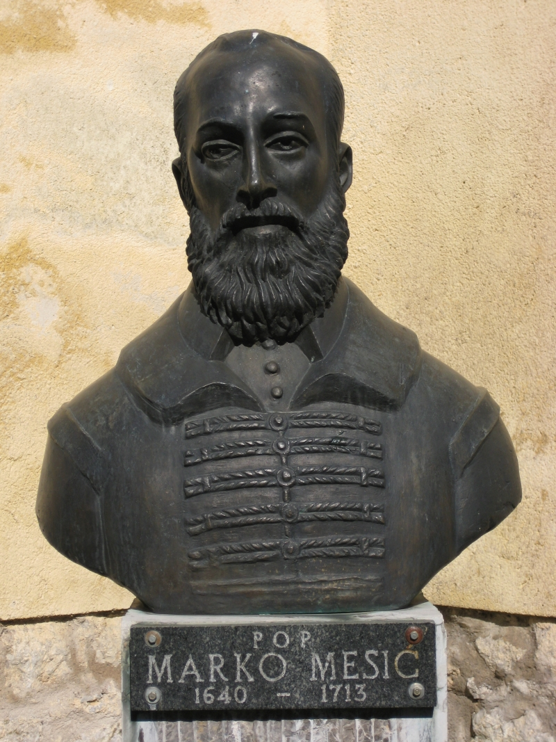 Spomenik popu Marku Mesiću, Brinje, Croatia